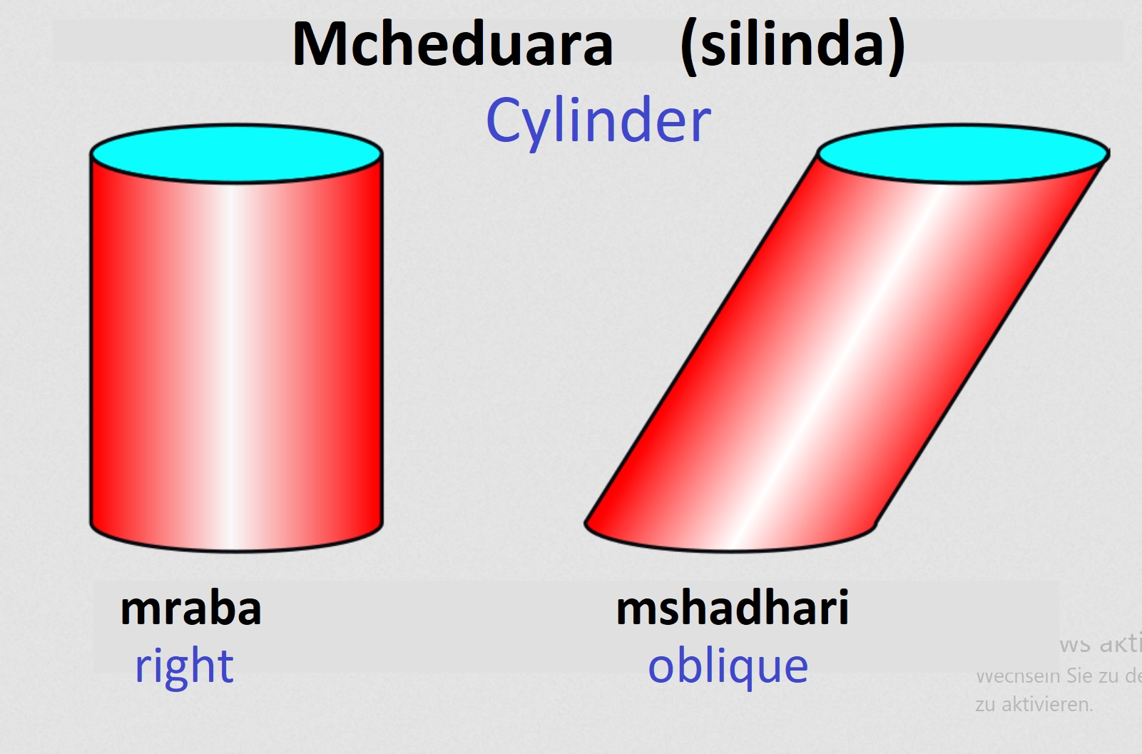 Kiswahili: Mcheduara mraba na mshadhari